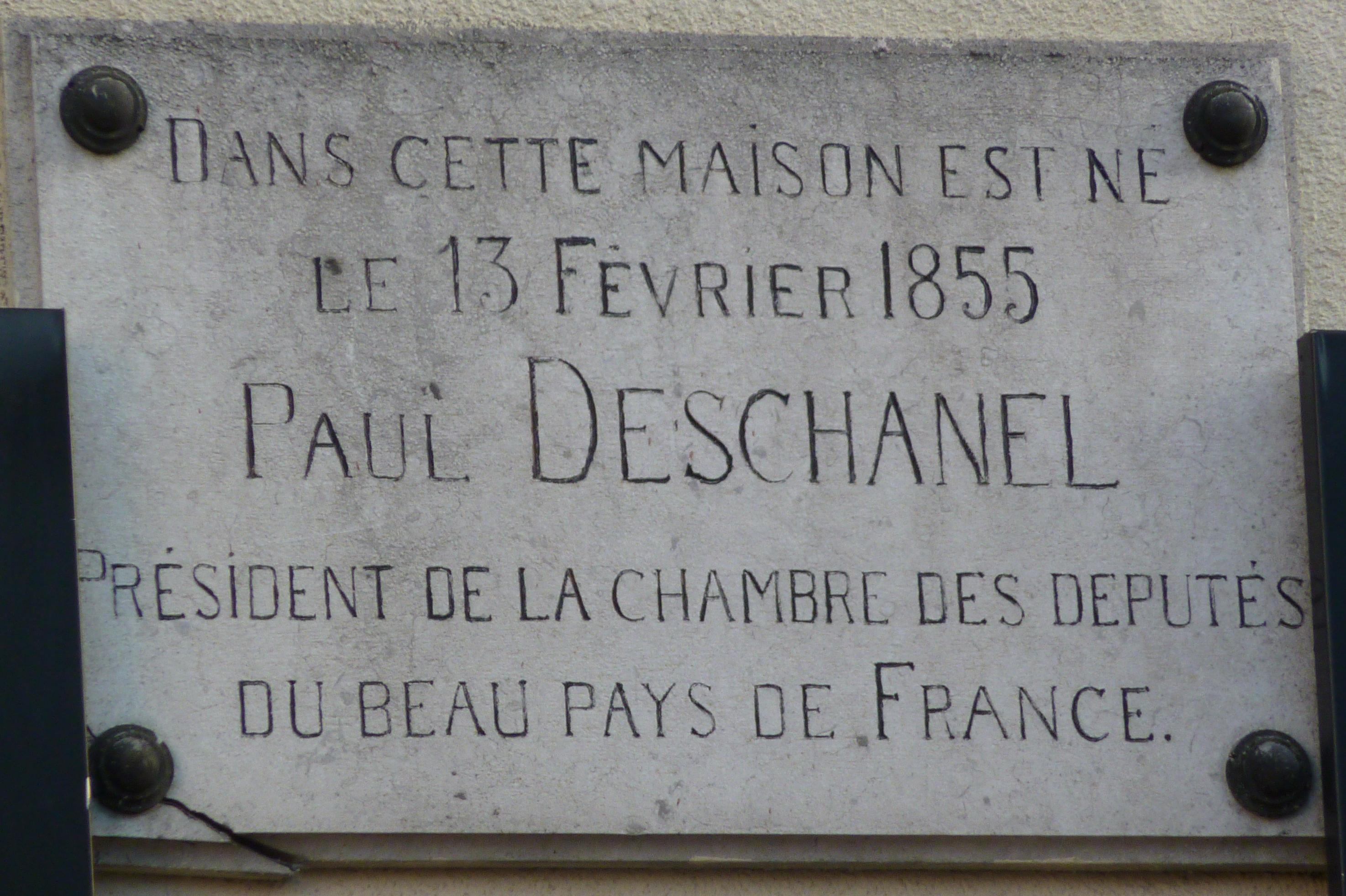 Une plaque commémorative rappelle que Paul Deschanel, devenu président de la République française en 1920, naquit à Schaerbeek.